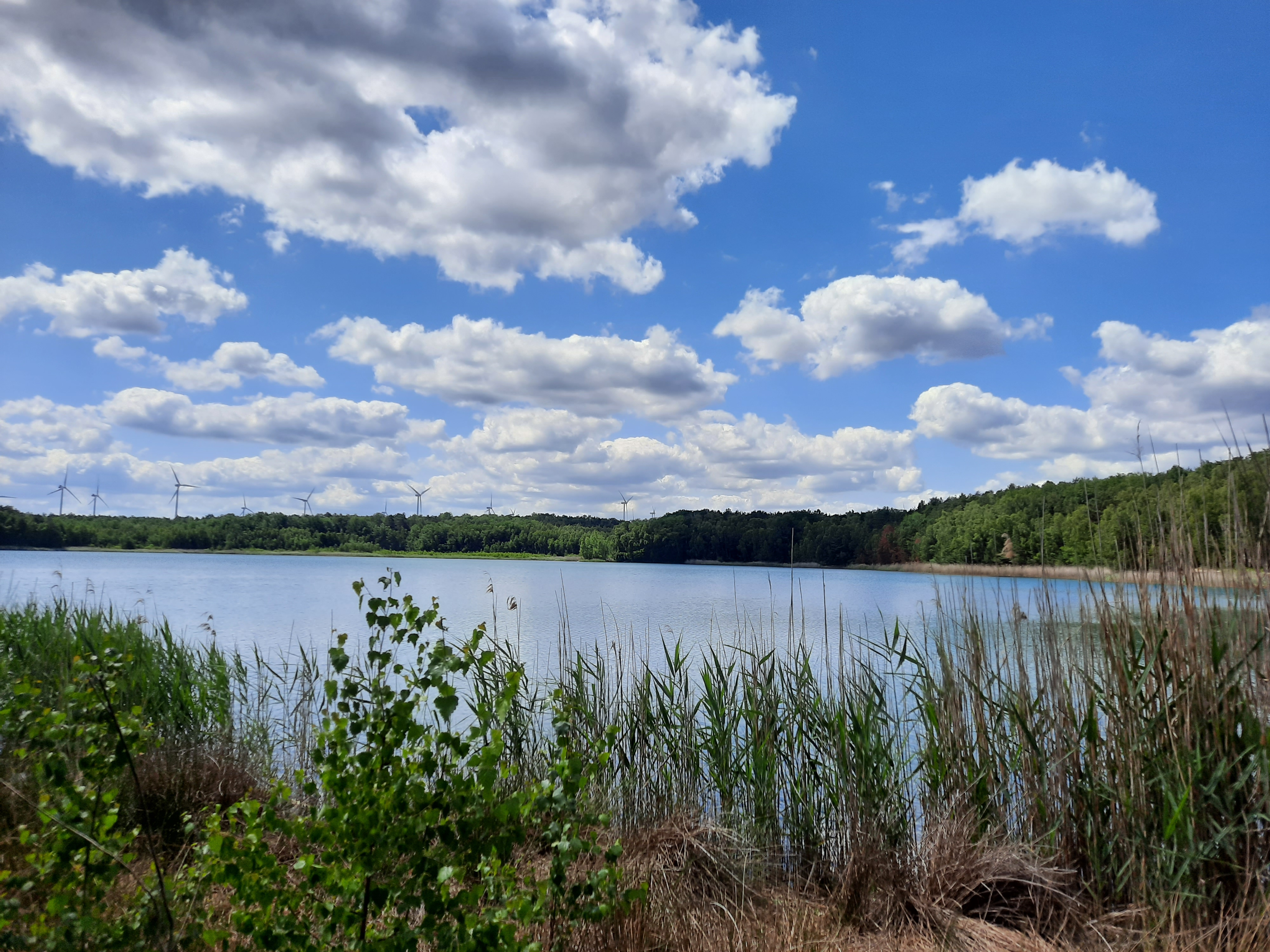 Ansicht Poleysee bei Saalgast